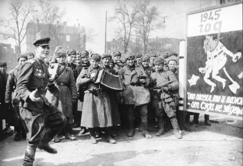 Berlin, Siegesfeier der Roten Armee ADN-ZB/Archiv II.Weltkrieg 1939-45 Die erbitterten Kämpfe um Berlin sind am 2. Mai 1945 beendet. Groß ist die Freude der Soldaten der siegreichen Roten Armee.